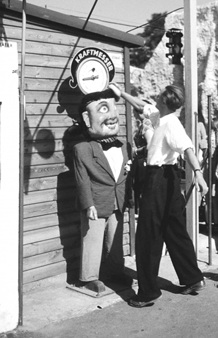 Wiener Wurstelprater: Ein Watschenmann